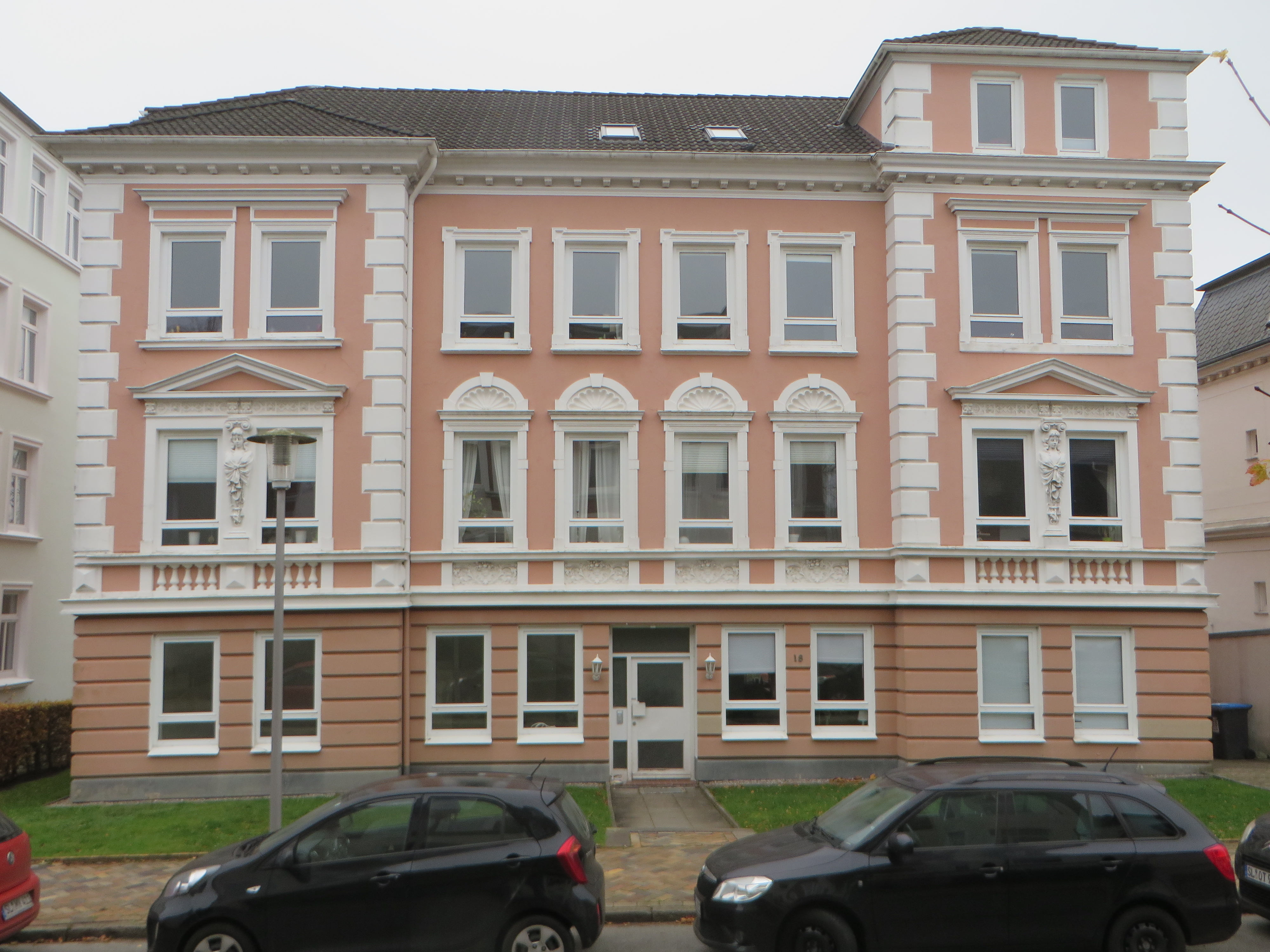 Militärgerichtsgebäude (Flensburg 2018), Bild 01